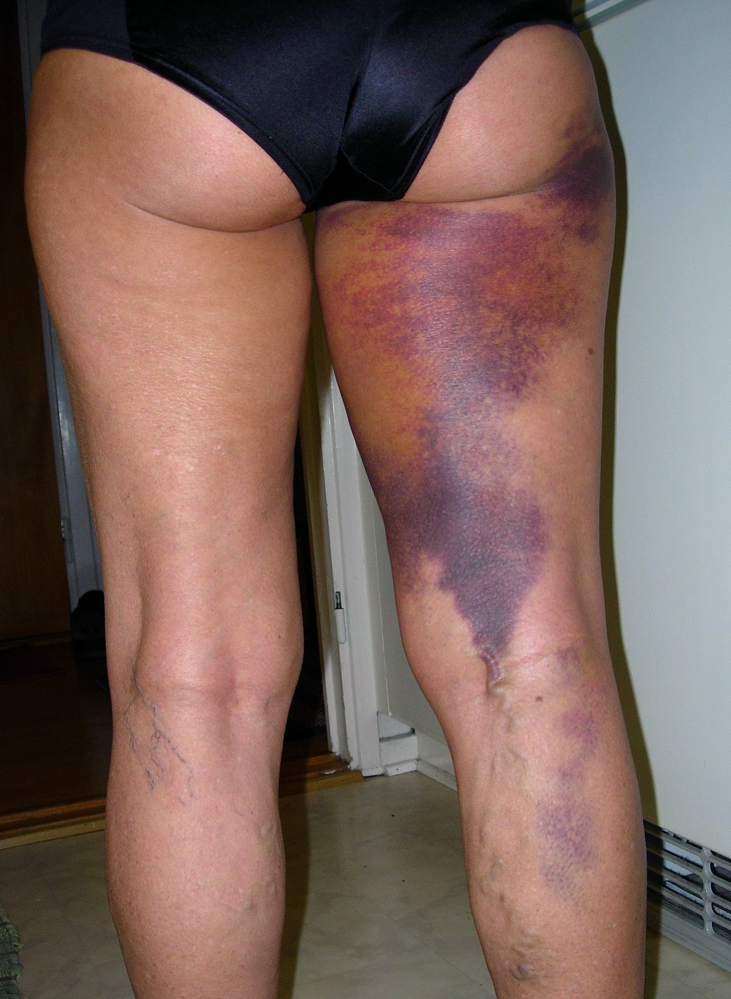 En kvinnas blåmärken efter ett svårt fall.